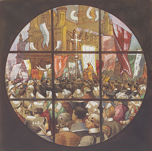 Transcription : Le projet porte les indications suivantes (en bas au centre) :"Projet de vitrail pour l'église d'Acigné M. Regnault architecte - La dévotion des bretons à Ste Anne d'Auray" " Th.B 1904". La scène représente une procession devant une église. Le premier plan est occupé par de très nombreuses personnes vues de dos. Toutes les femmes représentées, portent coiffe et costume traditionnel : coiffes d'Ille-et-Vilaine, de Pont-L'Abbé, de Quimper, de Fouesnant... Au second plan, on aperçoit des bannières de diverses couleurs ainsi qu'une statue de la Vierge, avec, au loin, la façade de l'église de Sainte-Anne-d'Auray.